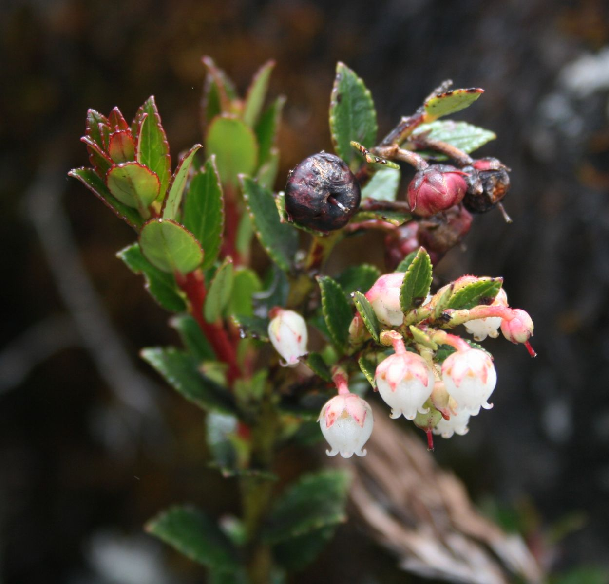 Gaultheria myrsinoides (= Pernettya prostrata), Heidekrautgewächse (Ericaceae) - Costa Rica: Prov. San José, Cordillera de Talamanca, Cerro Sákira E Carretera Interamericana, 3300-3350 m